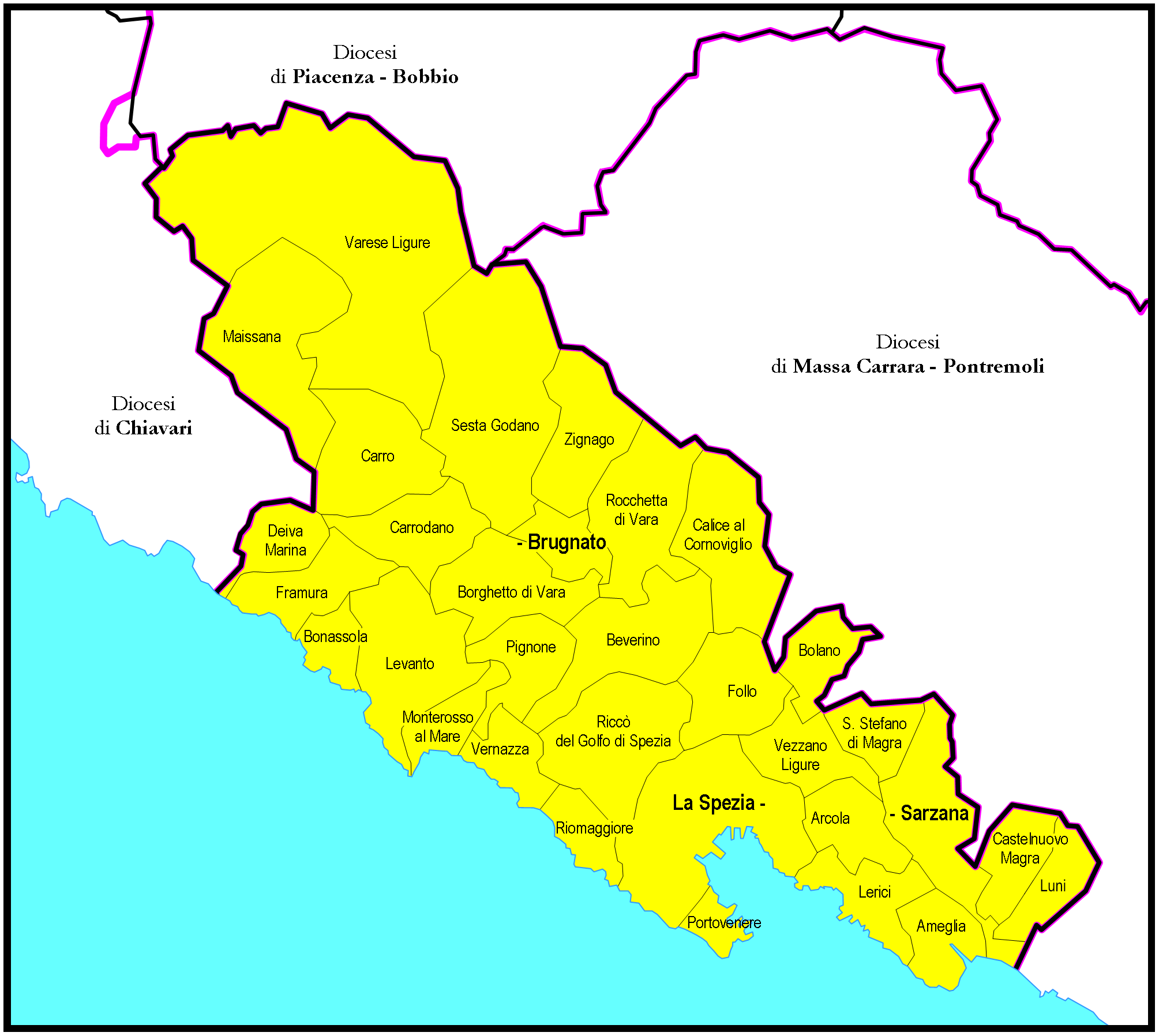 Mappa della Diocesi di La Spezia - Sarzana - Brugnato